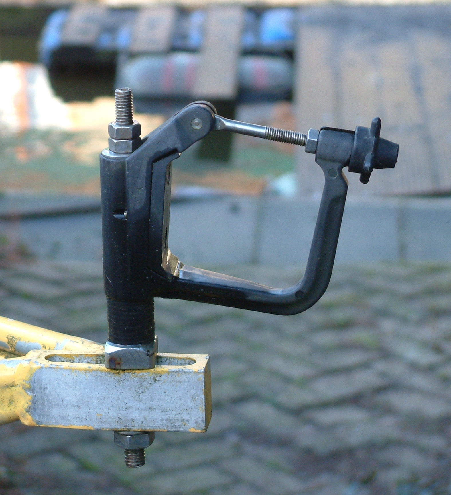 Dol met overslag Categorie:Roeien